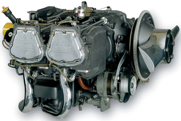 Авиационный двигатель Лайкоминг